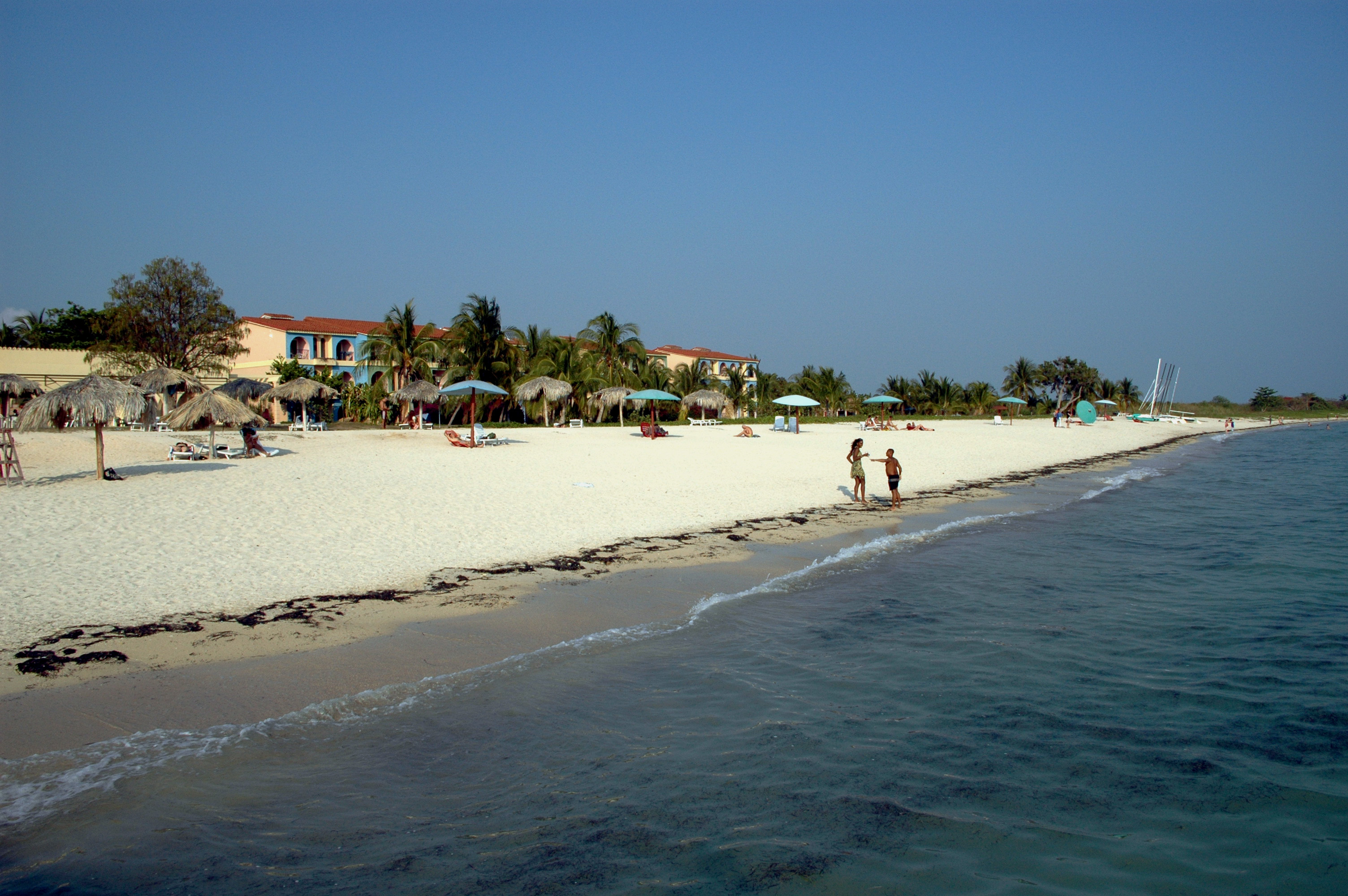 Cuba, Playa Ancon nella provincia di Sancti Spiritus